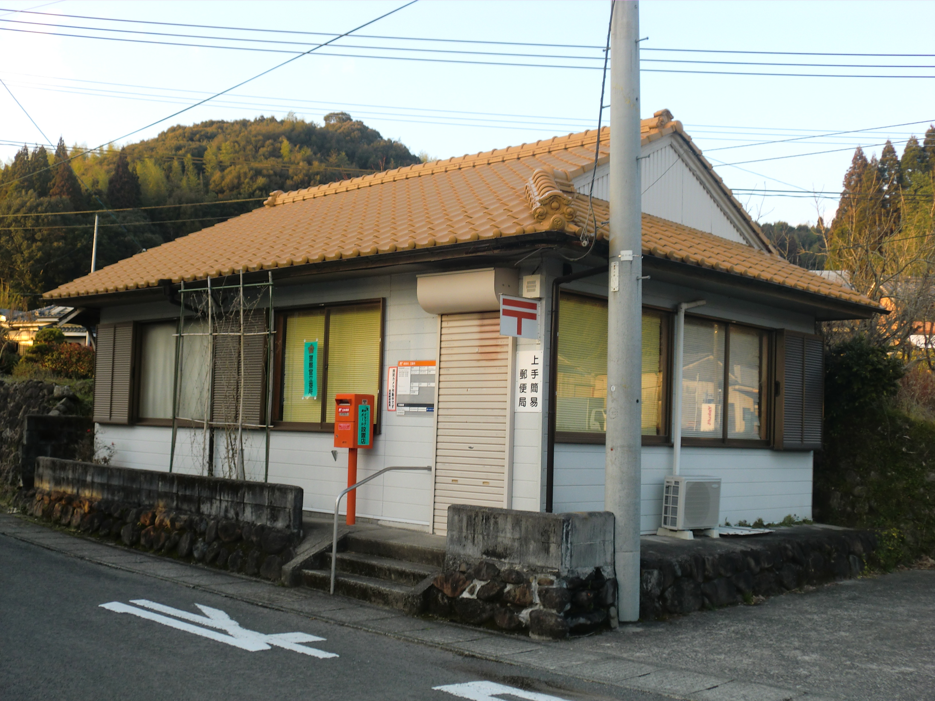 薩摩川内市にある上手（かみて）簡易郵便局